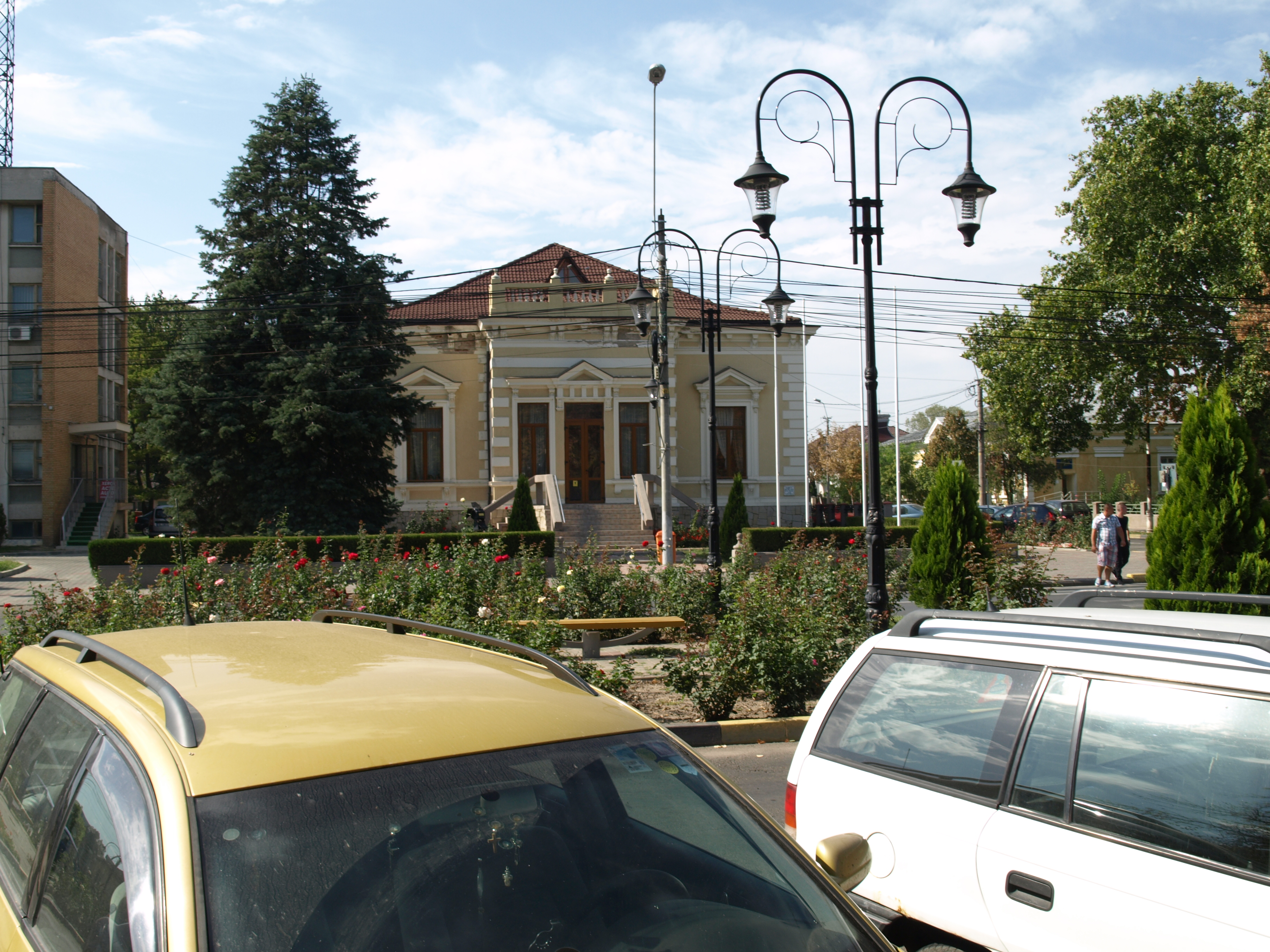 Casa Tache Anastasiu, azi Camera de Comerț, Industrieși Agricultură